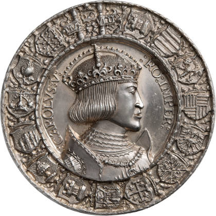 Hans Krafft d. Ä., nach Entwurf Albrecht Dürers, Dedikationsmedaille der Stadt Nürnberg, 1521, München, Foto: Nicolai Kästner